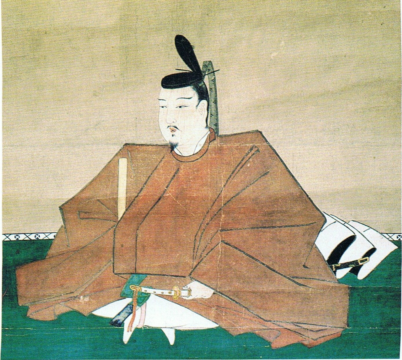 源範頼像。横浜市金沢区 太寧寺所蔵